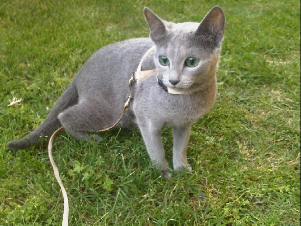 Gata Azul Ruso